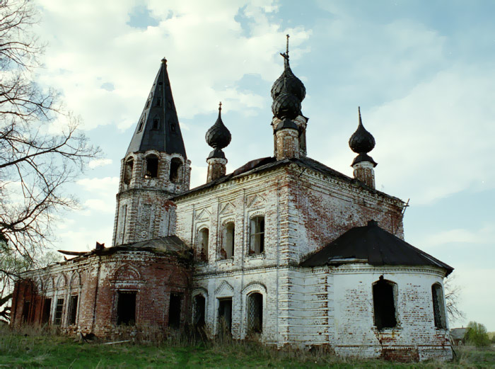 Храм Рождества Христова в Сокольском (Лухский р-н)